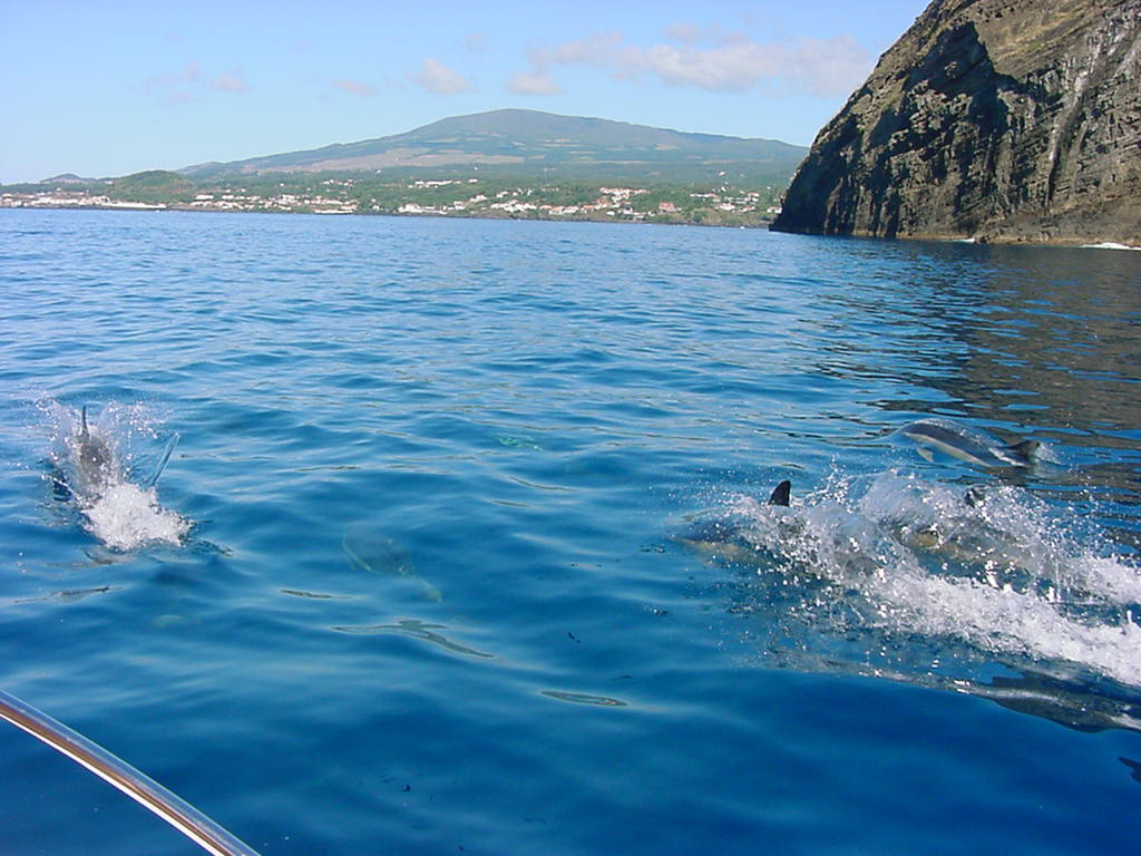 Cardume de Golfinhos junto ao Monte Brasil, ilha Terceira, Açores